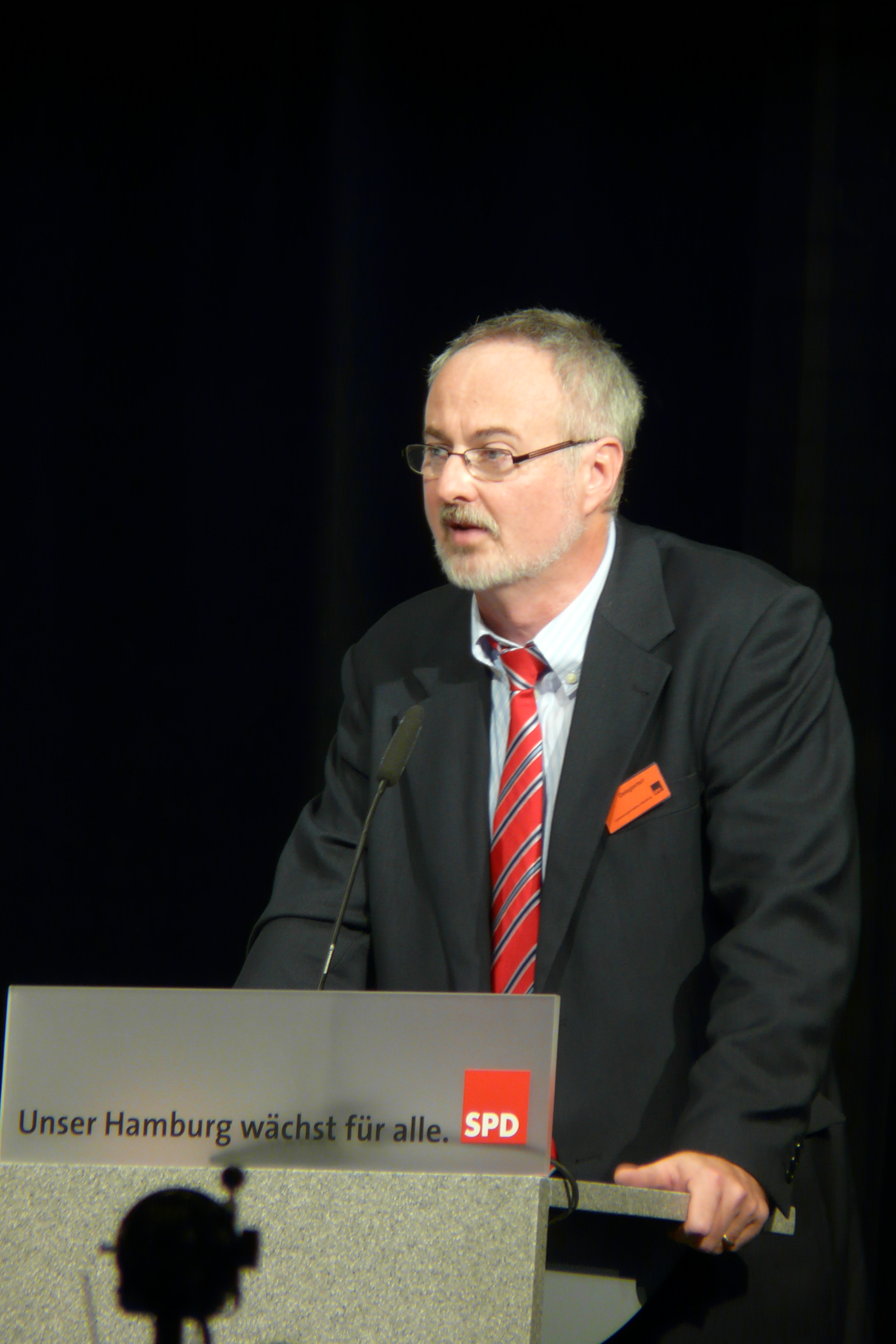 Ingo Egloff, Landesvorsitzender SPD Hamburg